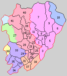 後の大阪府三島郡域の町村制時点の町村。